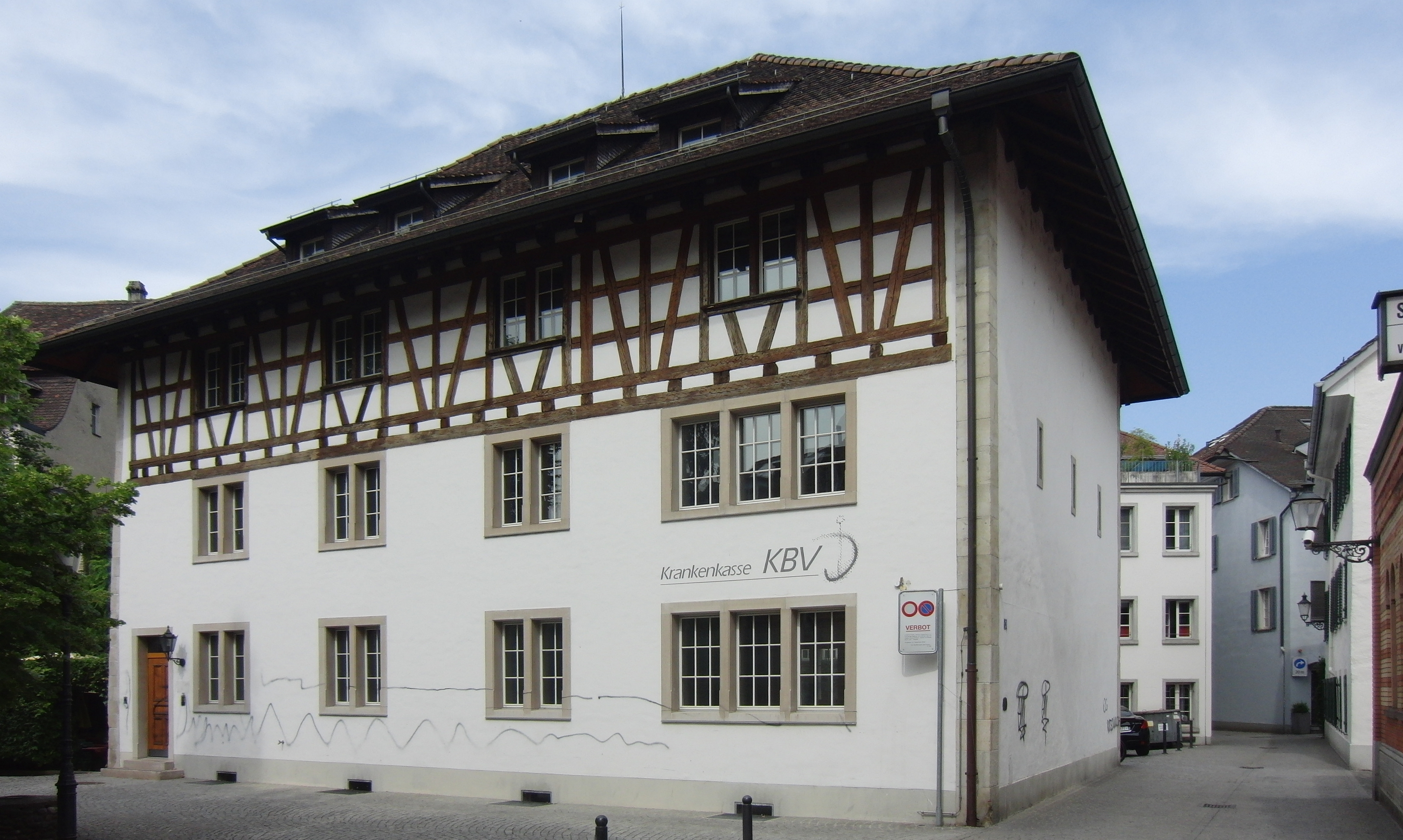 Der ehemalige Krankenkasse KBV-Hauptsitz in der Winterthurer Altstadt.